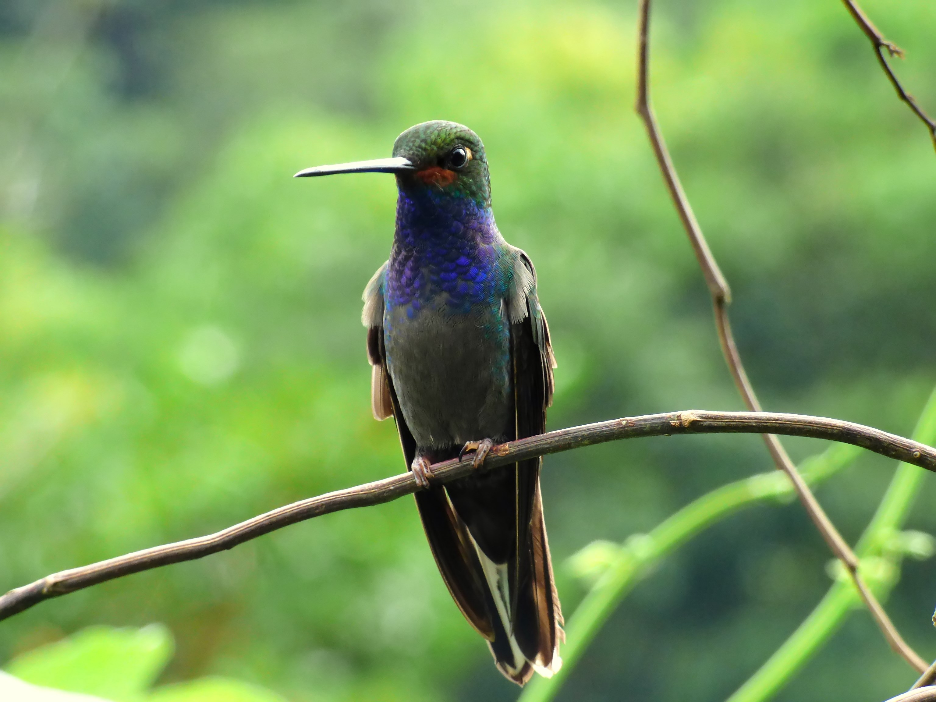 Urochroa bougueri (Colibrí nagüiblanco)